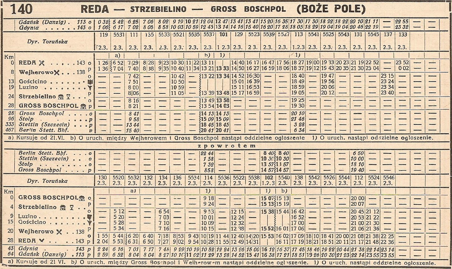 Tabela 140 (Reda - Gross Boschpol)